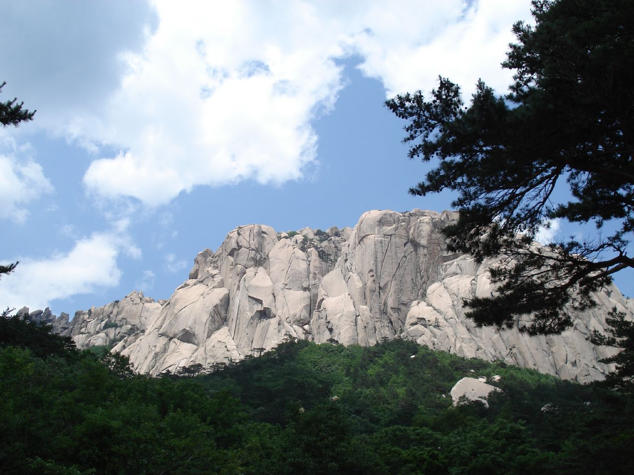 Seoraksan,South Korea